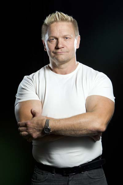 Luolamies